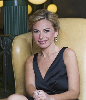 Sara Latife Ruiz Chávez